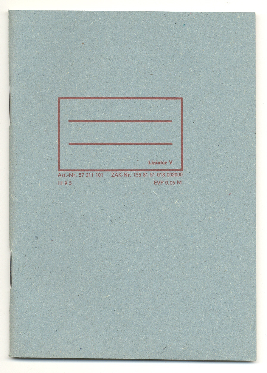 Muttiheft in der DDR (Oktavheft, DIN A6)